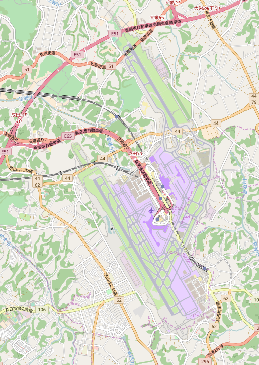 成田国際空港周辺の地図 This map of Chiba was created from OpenStreetMap project data, collected by the community. This map may be incomplete, and may contain errors. Don't rely solely on it for navigation.